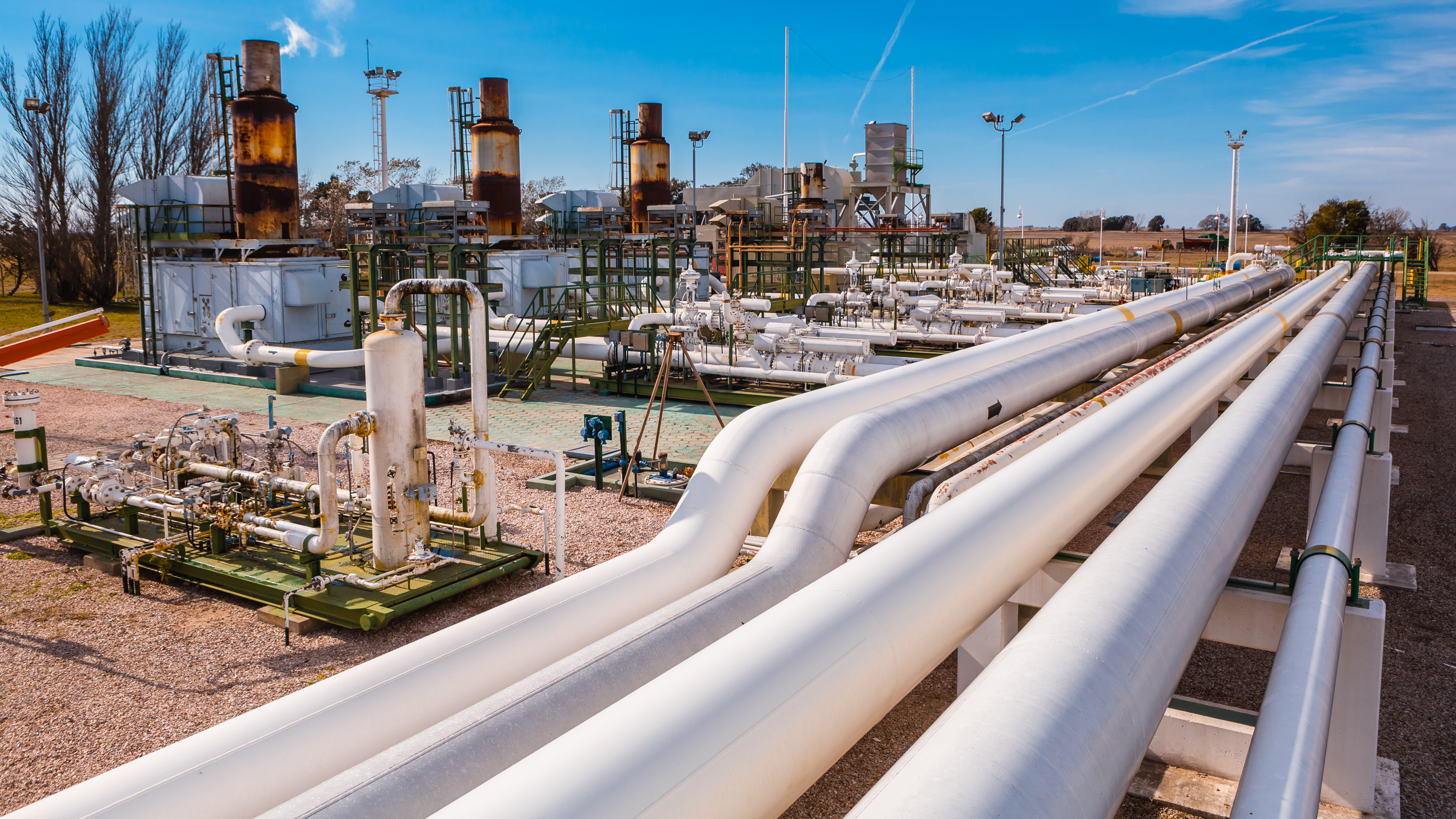 Imagen de la planta de TGS